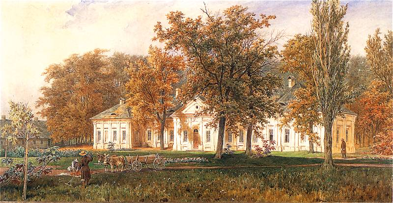 Pałac Czartoryskich w Sieniawie. Akwarela. 45 x 80,5 cm.